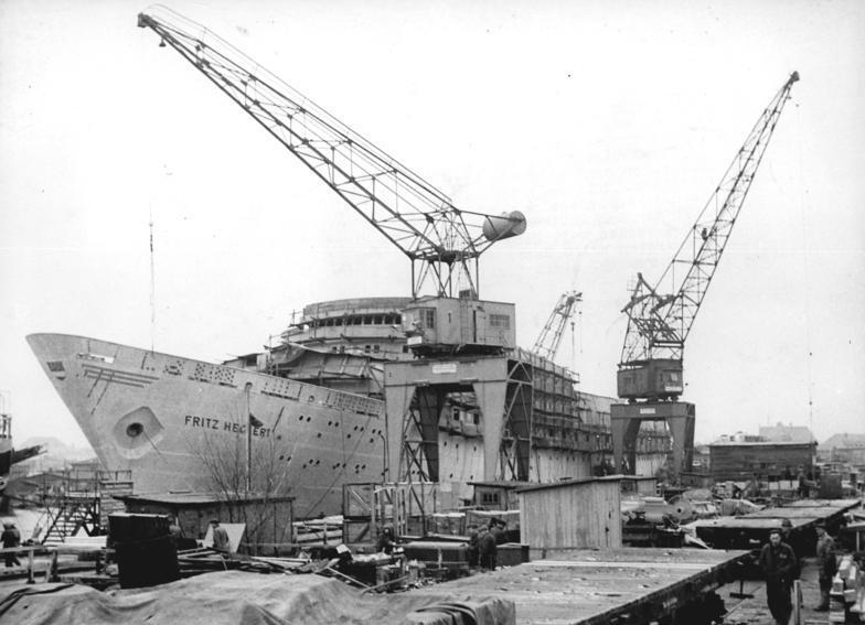 Zentralbild-Preiß 31.12.1960 FDGB-Urlauberschiff in Endmontage. Sichtbare Fortschritte hat der Bau des FDGB-Urlauberschiffes "Fritz-Heckert" auf der "Mathias-Thesen-Werft" gemacht. An Bord sind zur zeit Monteure aus sieben Zulieferbetrieben. Rote Brigaden aus drei weiteren Werften haben in sozialistischer Hilfe einzelne Bauabschnitte zur kompletten Fertigstellung übernommen. Ab Januar 1961 werden weit über 1000 Arbeiter im Drei-Schicht-System alles daran setzen, das Schiff vorfristig bis zum 15. April fertigzustellen. UBz.: Das FDGB-Urlauberschiff am Ausrüstungskai."